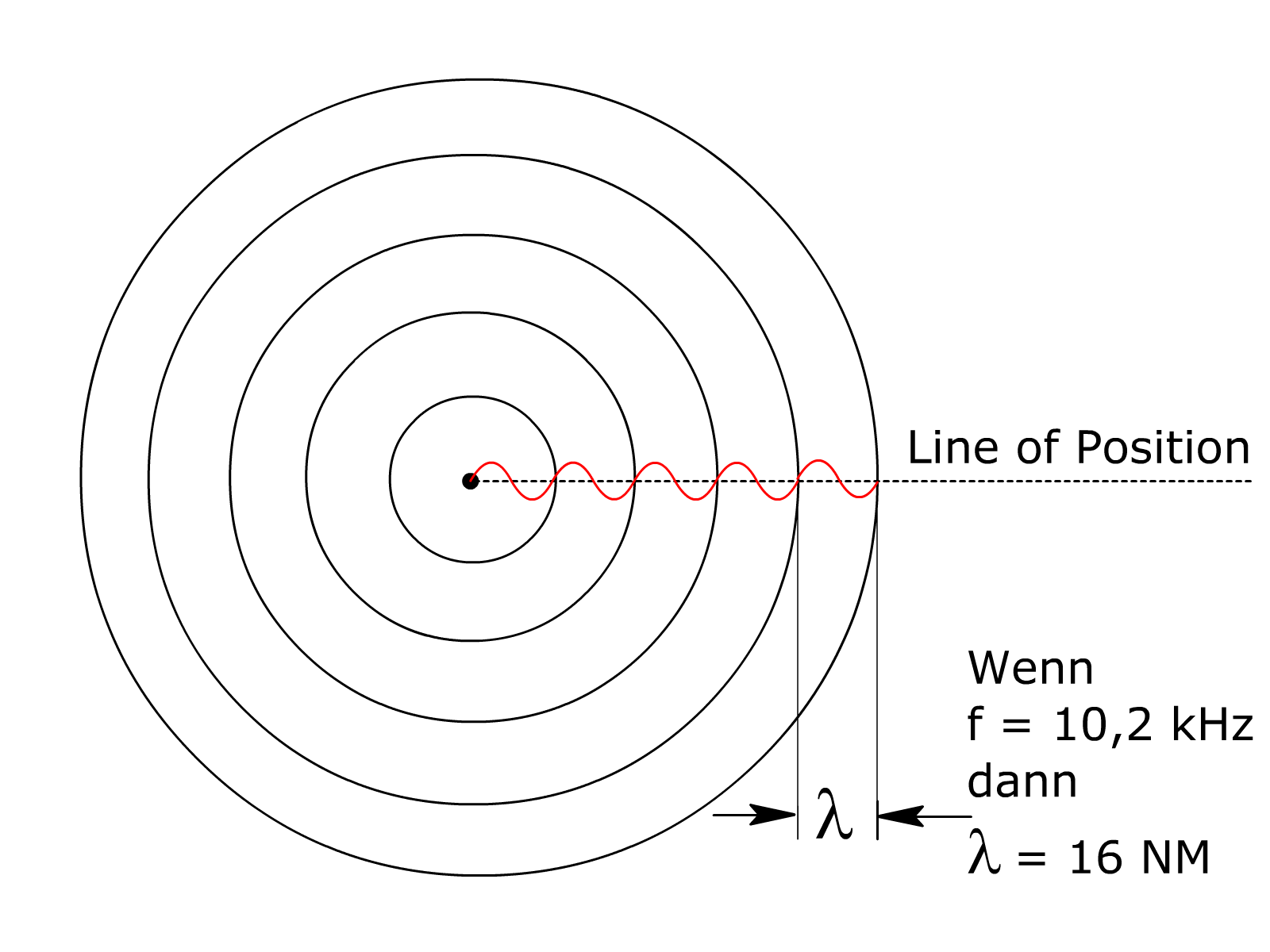 OMEGA Navigationssystem, Funktionsweise